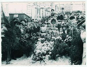 manifestations autour des victimes : révoltes du languedoc 1907